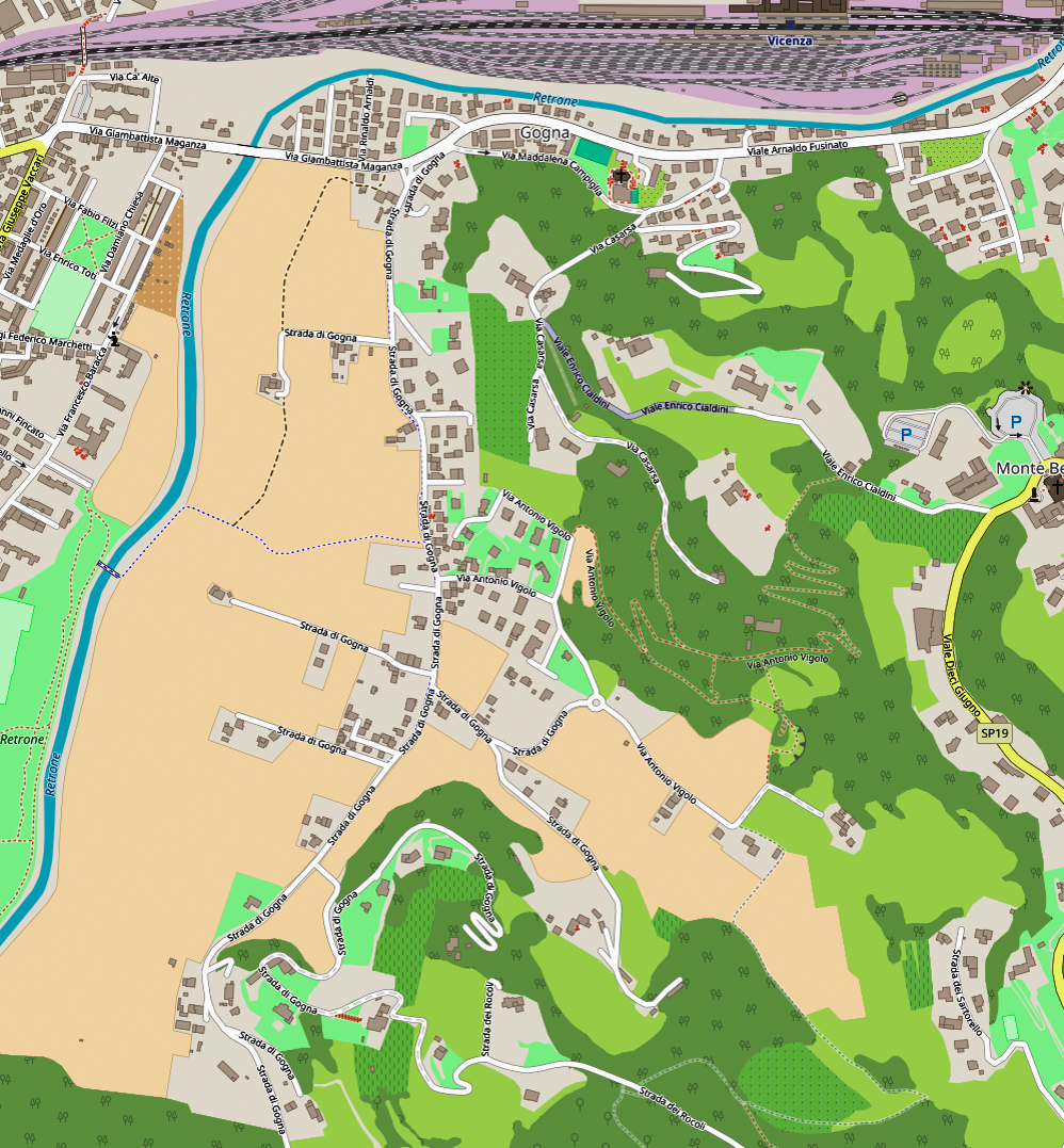 mappa Gogna